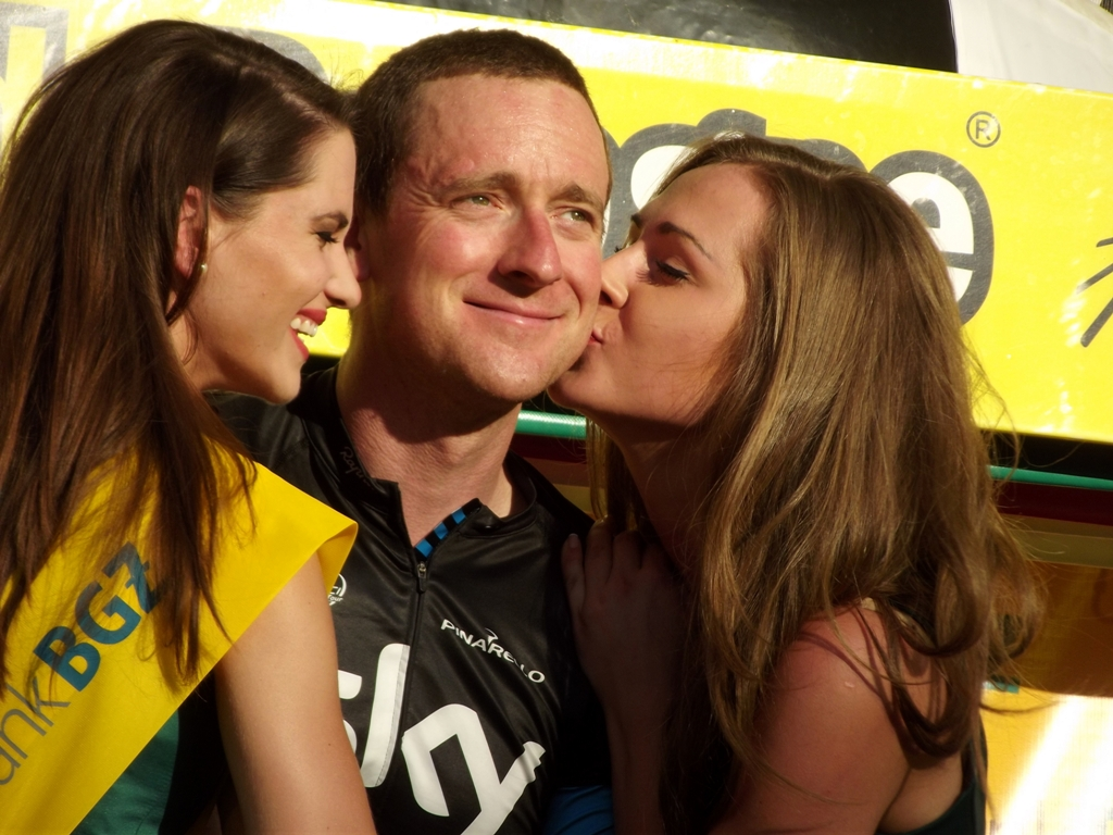 Zdjęcie zrobione podczas VII etapu 70. jubileuszowego Tour de Pologne w Krakowie.